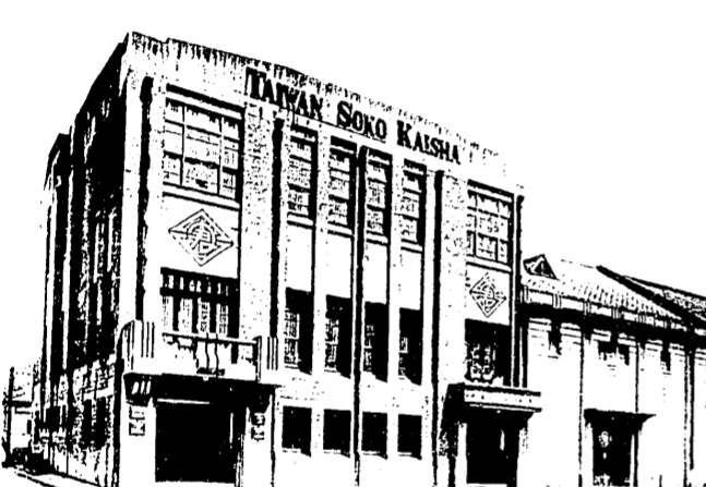 中文（台灣）: 台灣倉庫株式會社基隆本店